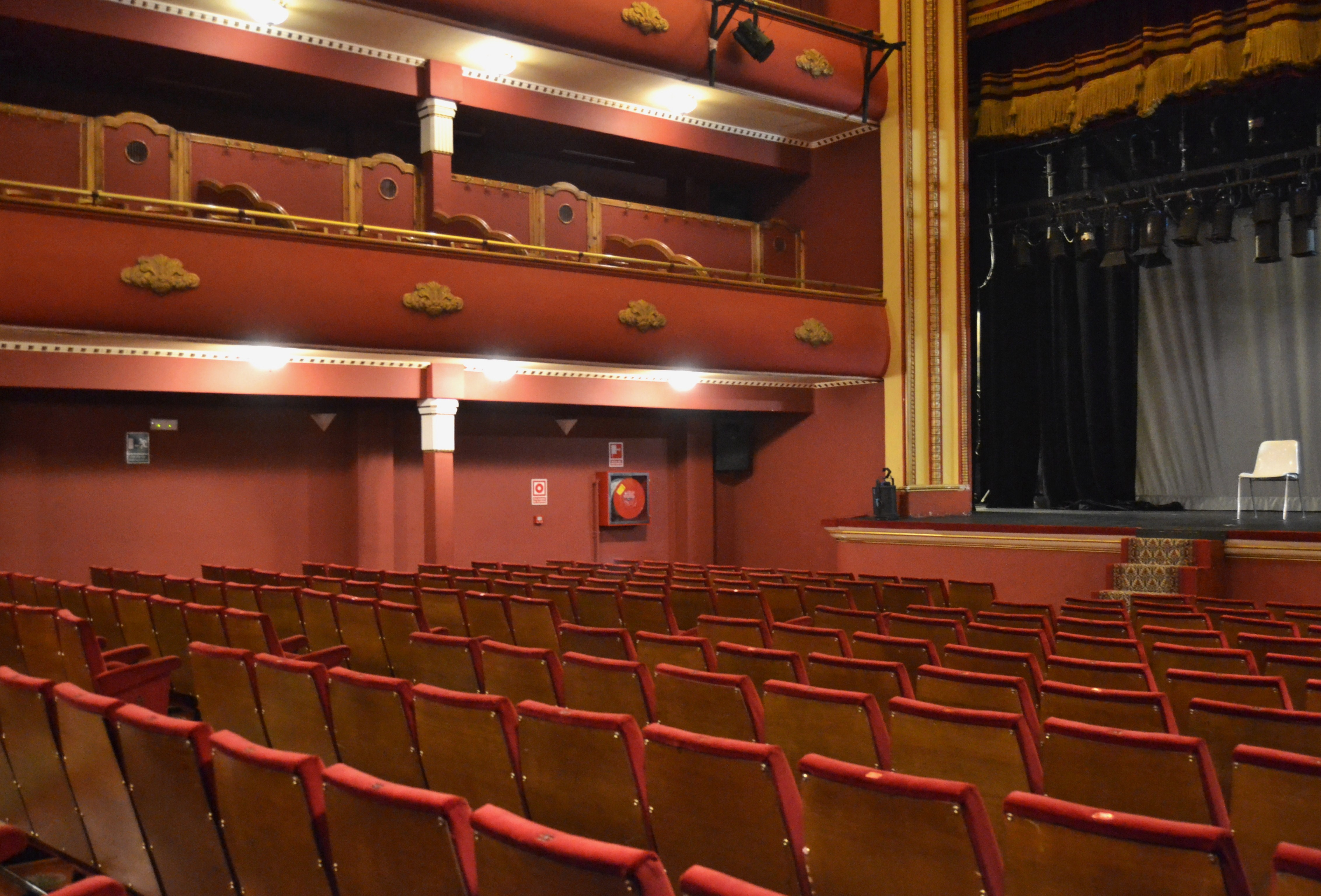 Pati de butaques del teatre Talia de València.